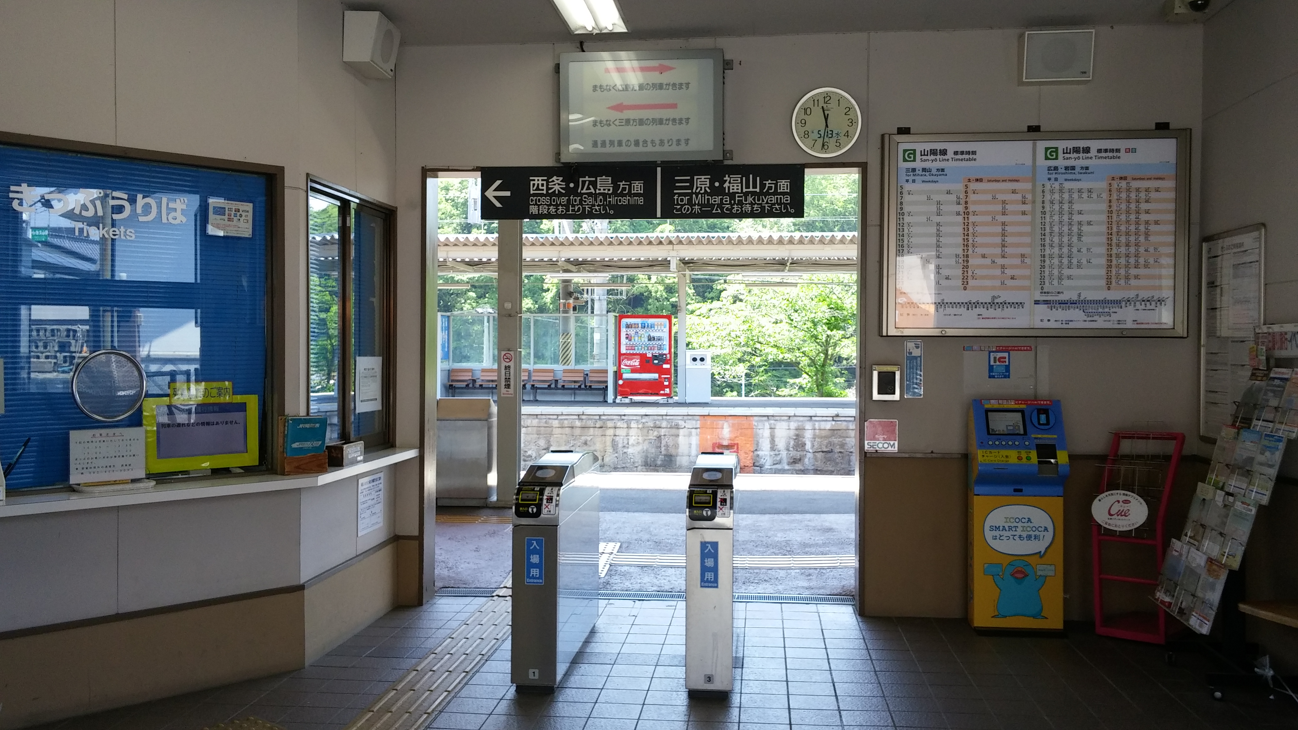 JR白市駅改札口